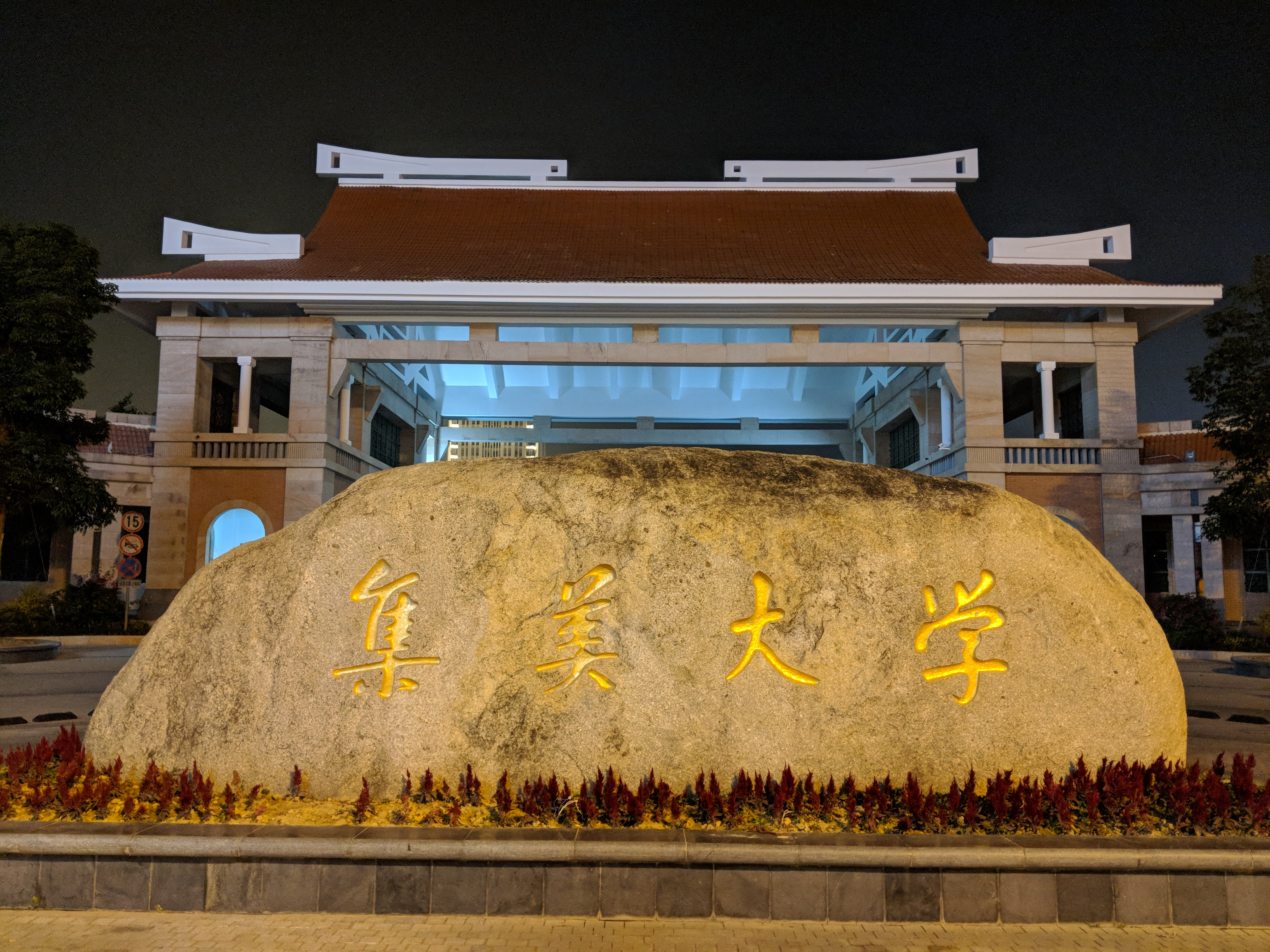 中文（中国大陆）: 集美大学银江校区（南门）